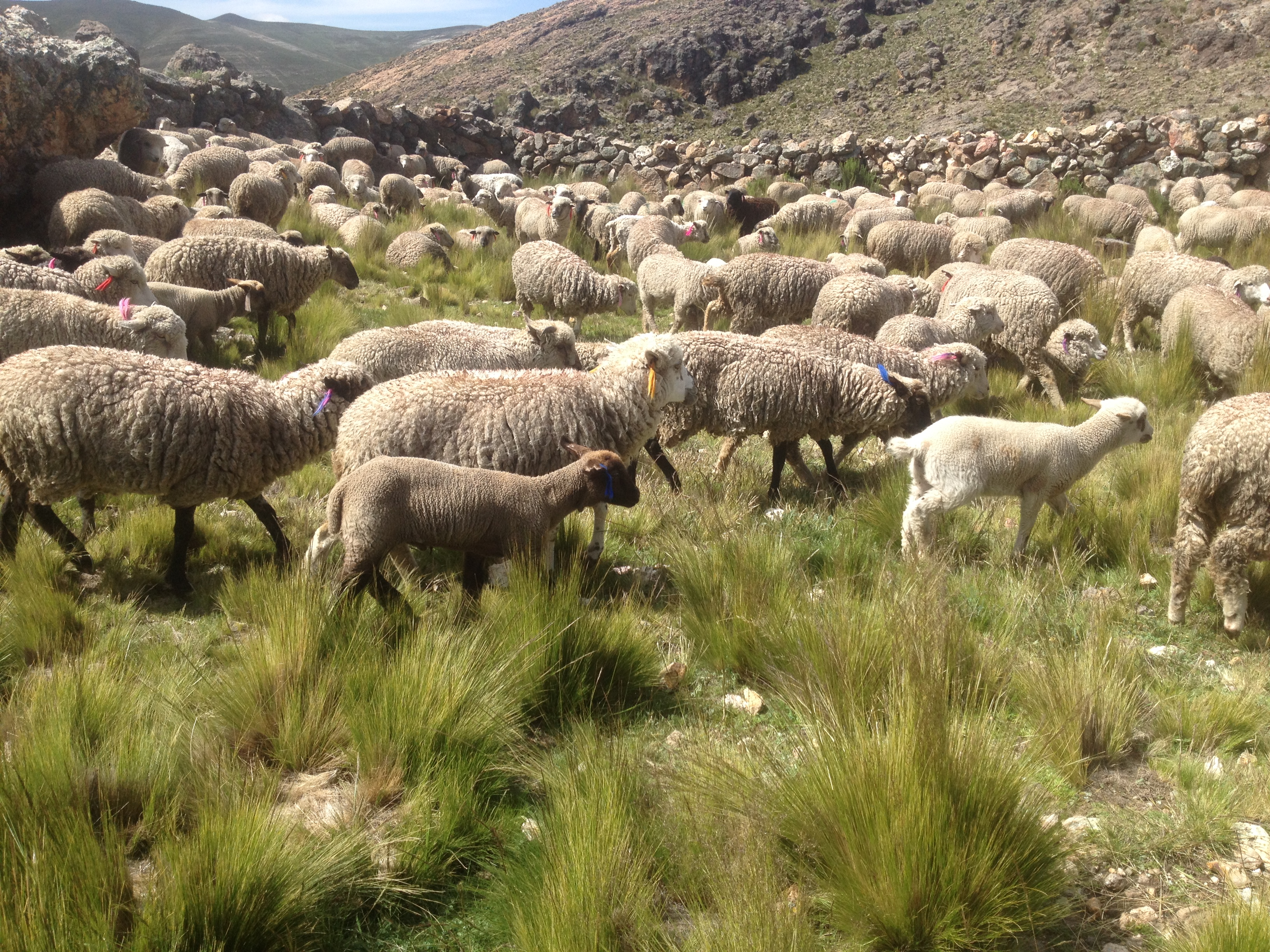 La comunidad campesina de San Juan de Yanacolpa se dedica casi en su totalidad a la crianza de ganado ovino